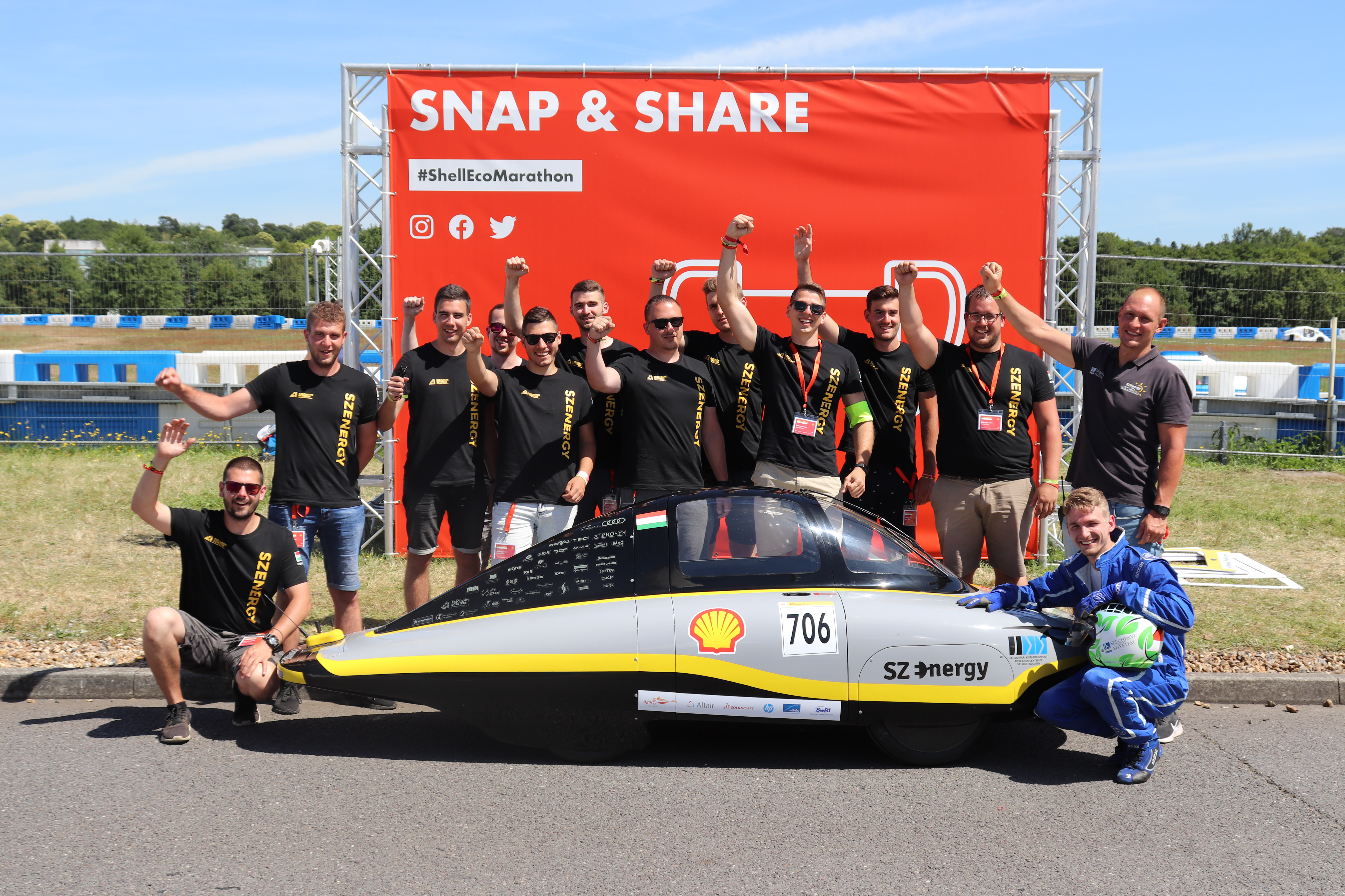 Csapatkép - 2019 London